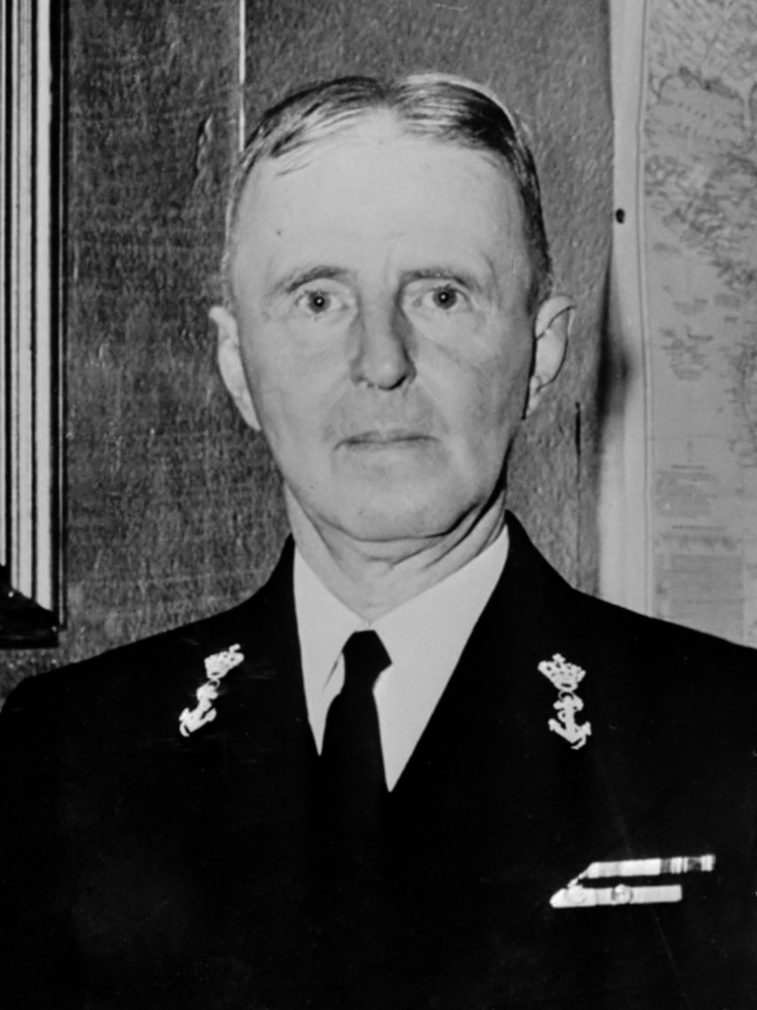 Schout-bij-nacht J.E. Meijer Ranneft, marine-attaché te Washington 1942